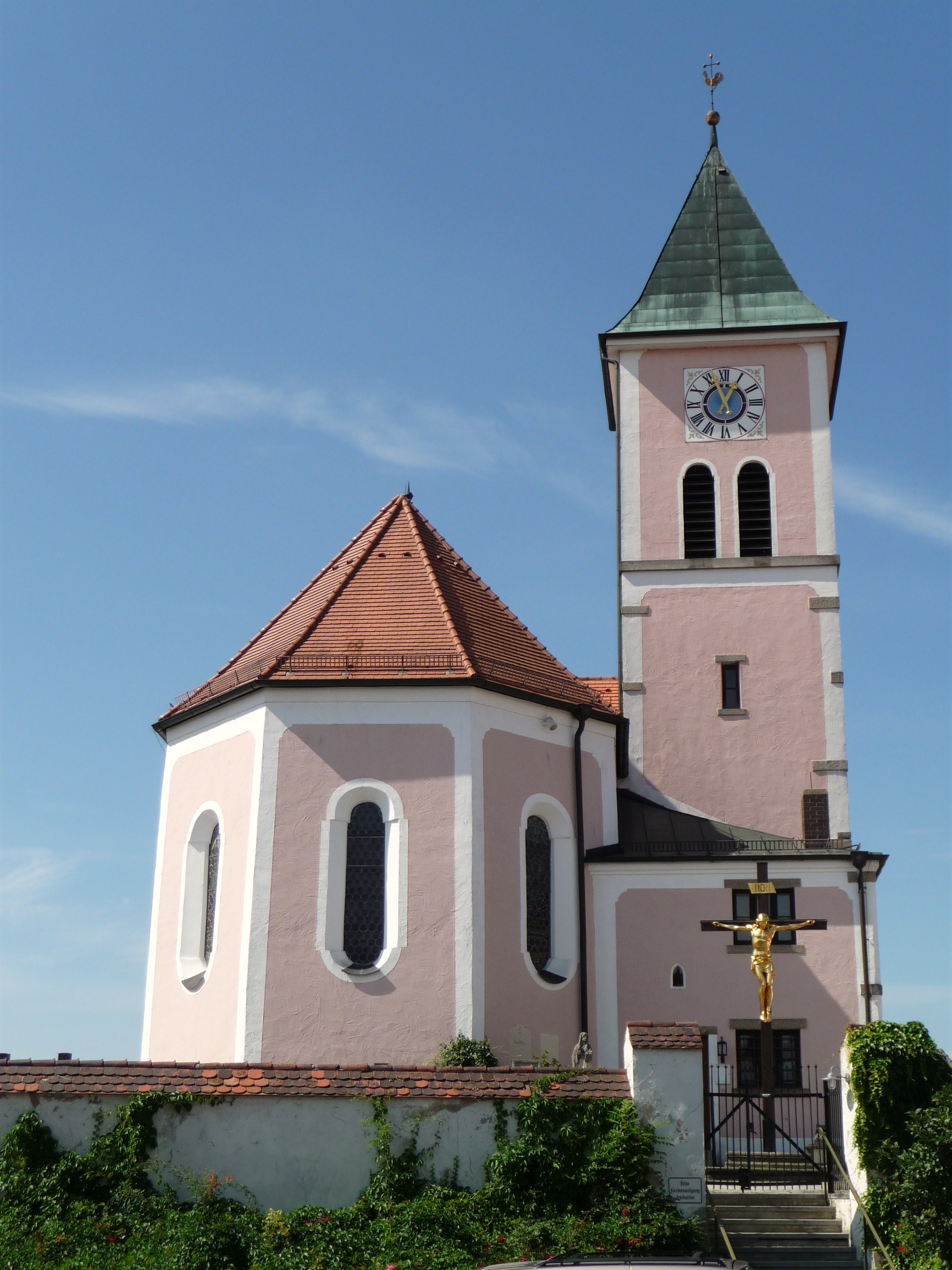 Die Pfarrkirche St. Vitus in Kirchroth